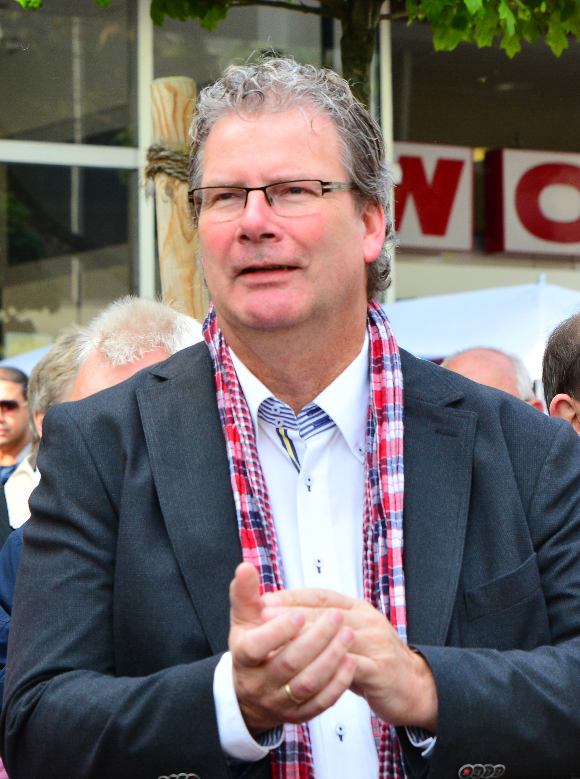 Thomas Hölck beim Holsteiner Apfelmarkt 2015